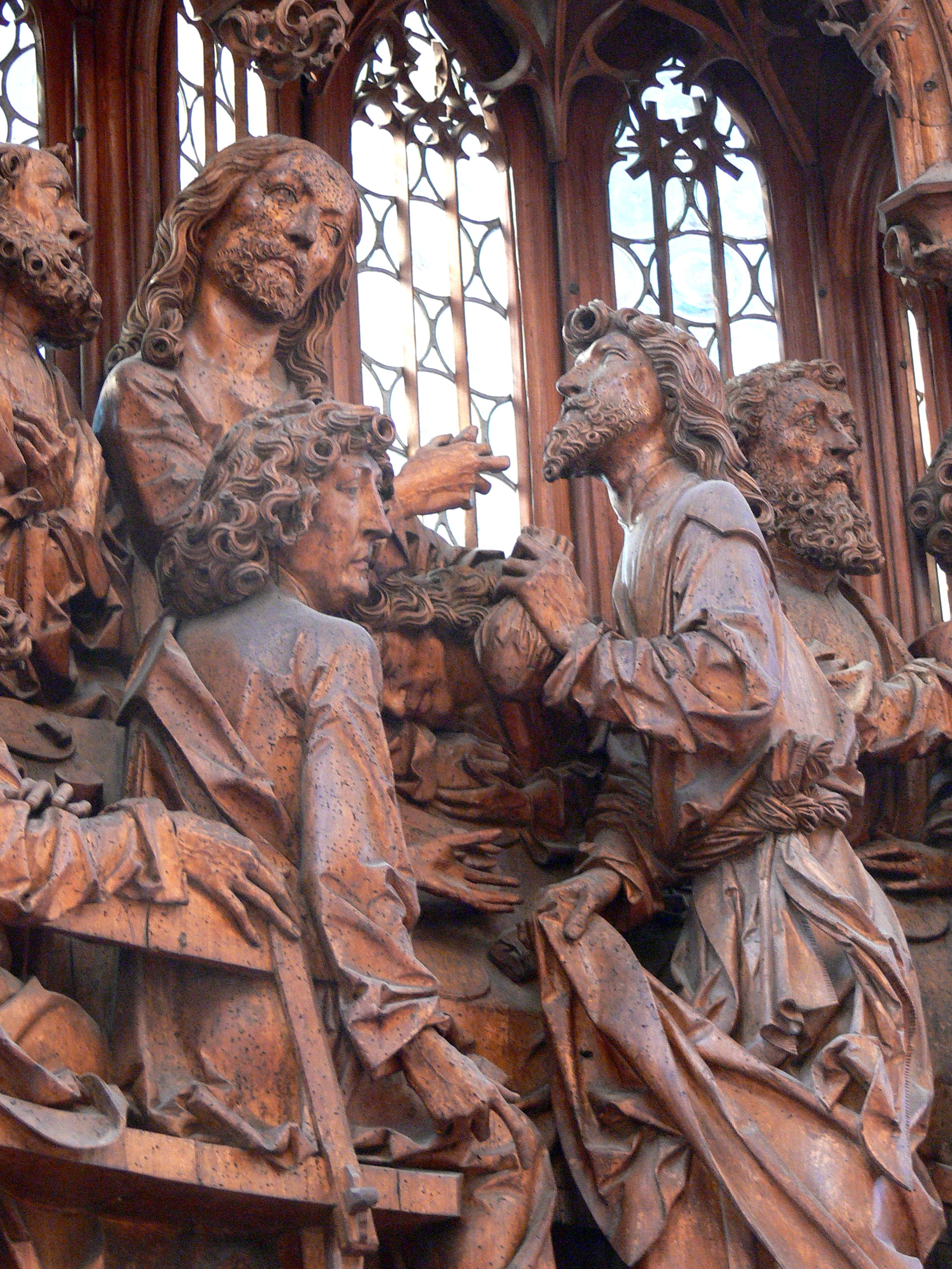 Heilig-Blut-Altar in St.Jakob in Rothenburg. Letztes Abendmahl: Jesus weist Judas zurück